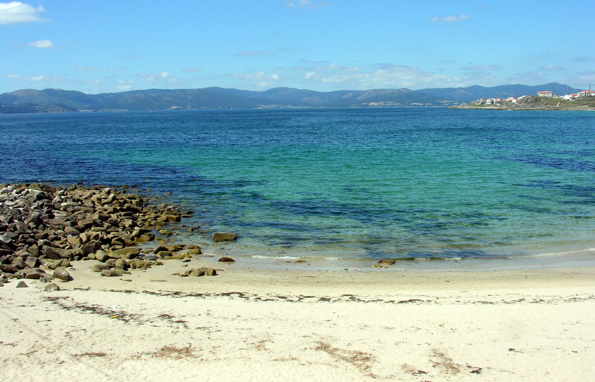 Praia de Arnela, Baroña, Porto do Son, Galicia